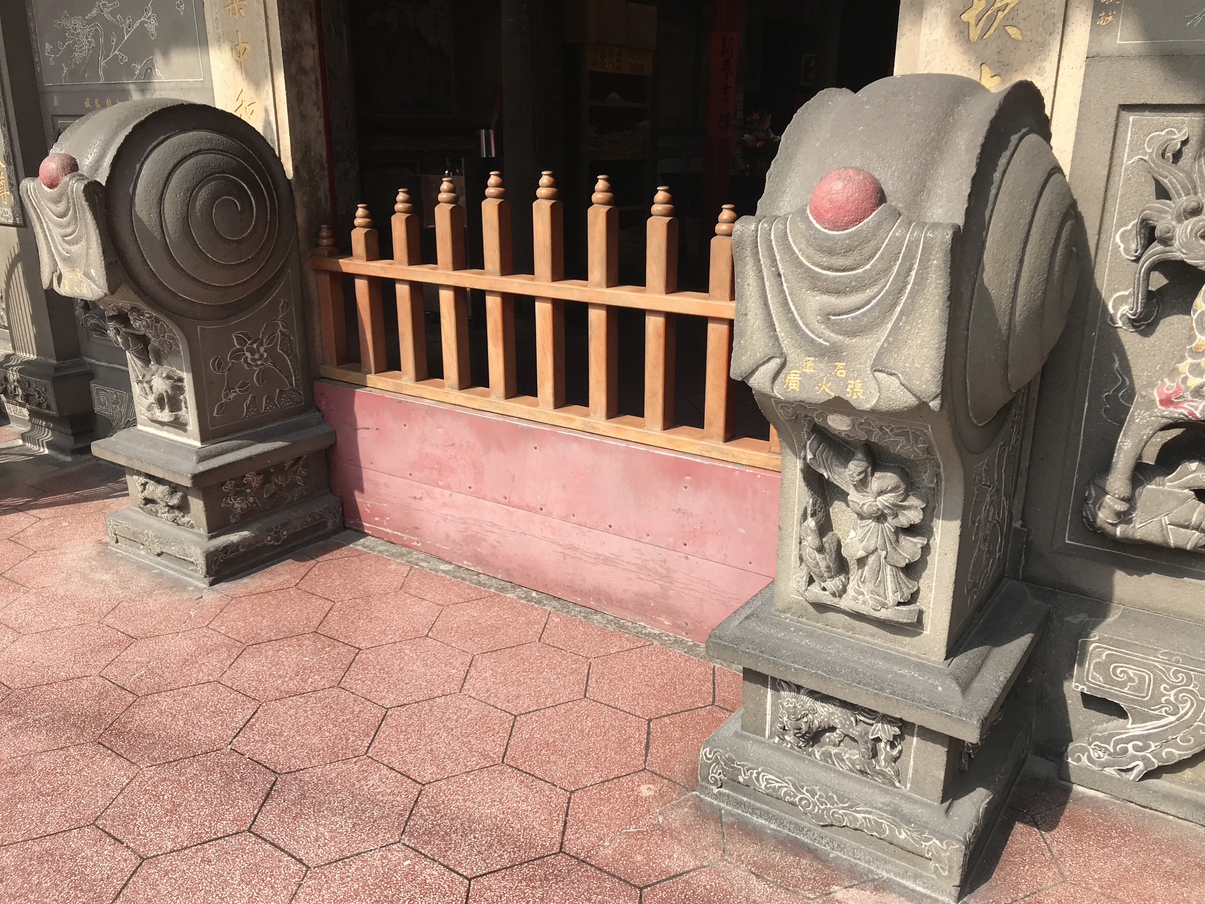 中文（台灣）: 八德三元宮石鼓